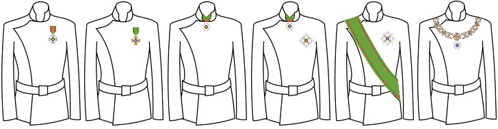 Modo di indossare le decorazioni dell'Ordine al Merito della Repubblica Italiana (Italia) - nuovo tipo